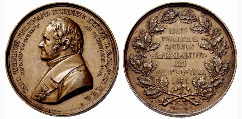 Gedenkmünze von Karl Heinrich Ferdinand Schütze Kaufmann und sächsischer Abgeordneter 1824-1836